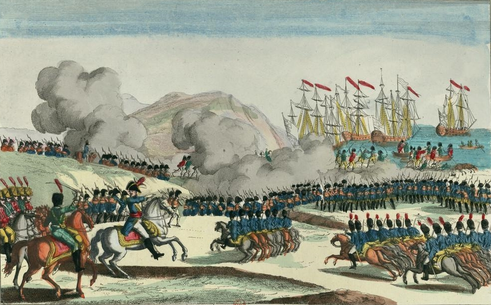 Retirada por mar das tropas inglesas ao remate da Batalla de Elviña, o día 17 de xaneiro de 1909.